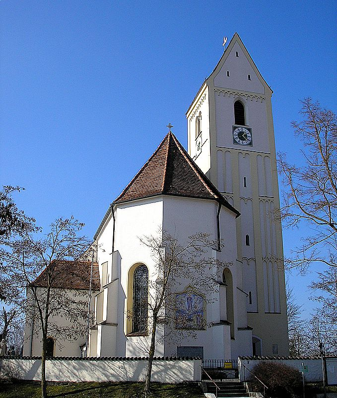 Pfarrkirche Mariä Himmelfahrt (Türkenfeld, Landkreis Fürstenfeldbruck, Oberbayern). Ansicht von Osten. Eigene Aufnahme, Febr. 2007 / Parish church "Assumption of Mary" (Tuerkenfeld near Fuerstenfeldbruck, Upper Bavaria, Germany). View from the east. Own photo, Febr. 2007